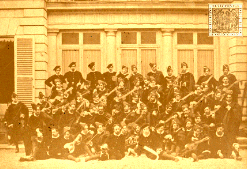 A famosa "Estudiantina Espanhola" que fez enorme sucesso no Carnaval de Paris em 1878